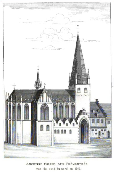 Vue de l'ancienne église Saint Corneille de l'abbaye de Beaurepart faite d'après un manuscrit de Langius